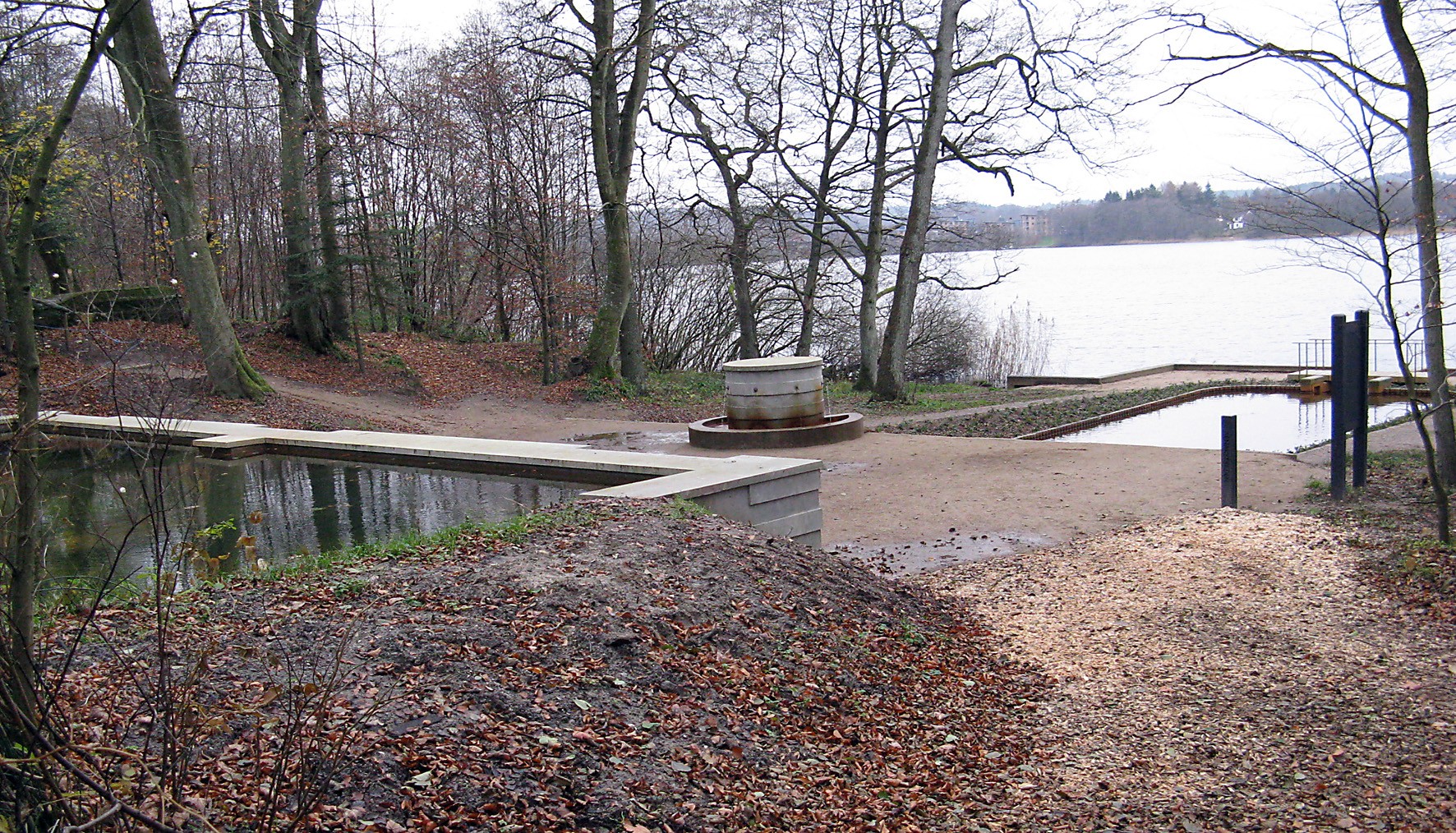 Arnakkekilden med Ørnsø i baggrunden.